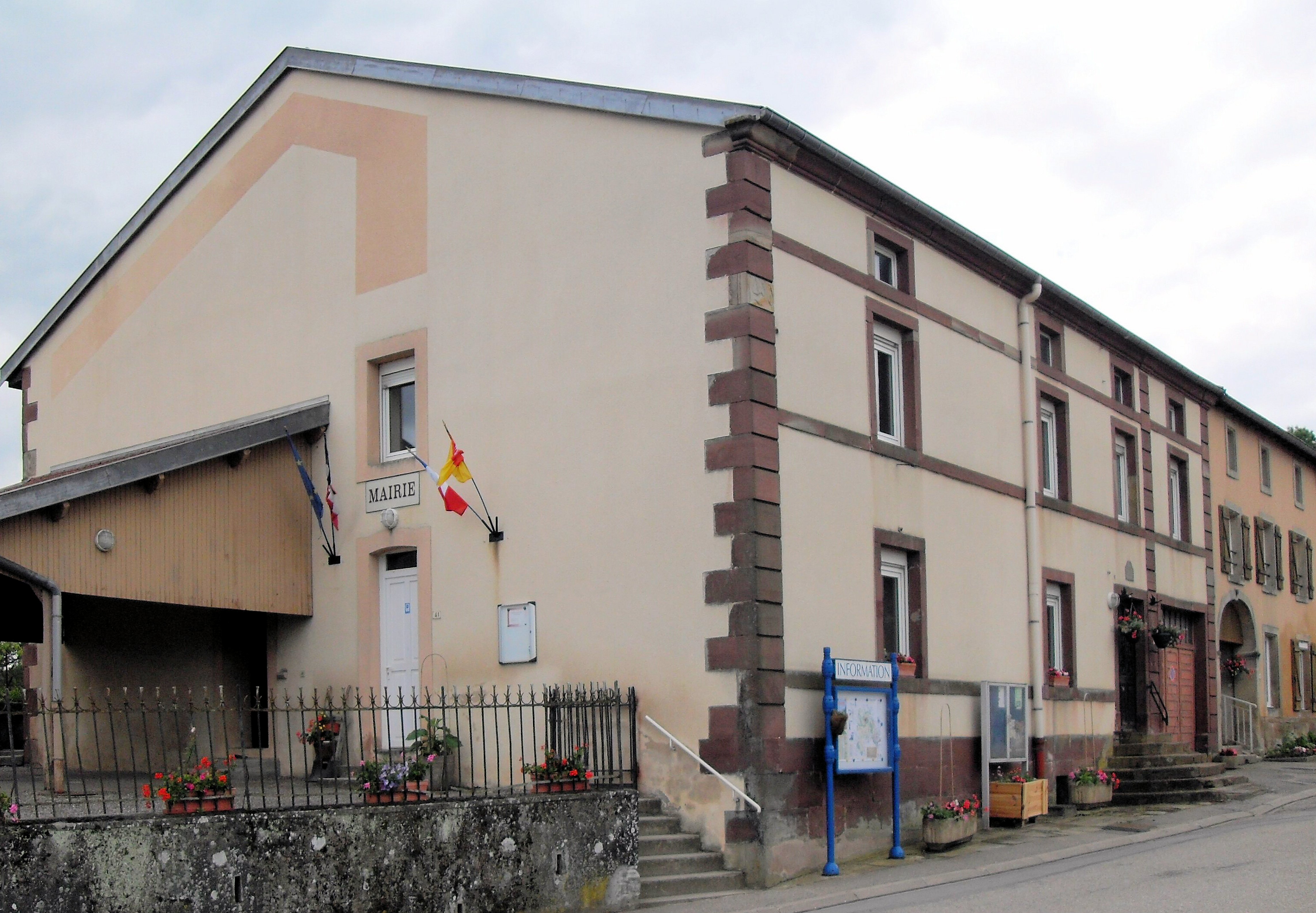 La mairie de Bouxières-aux-Bois